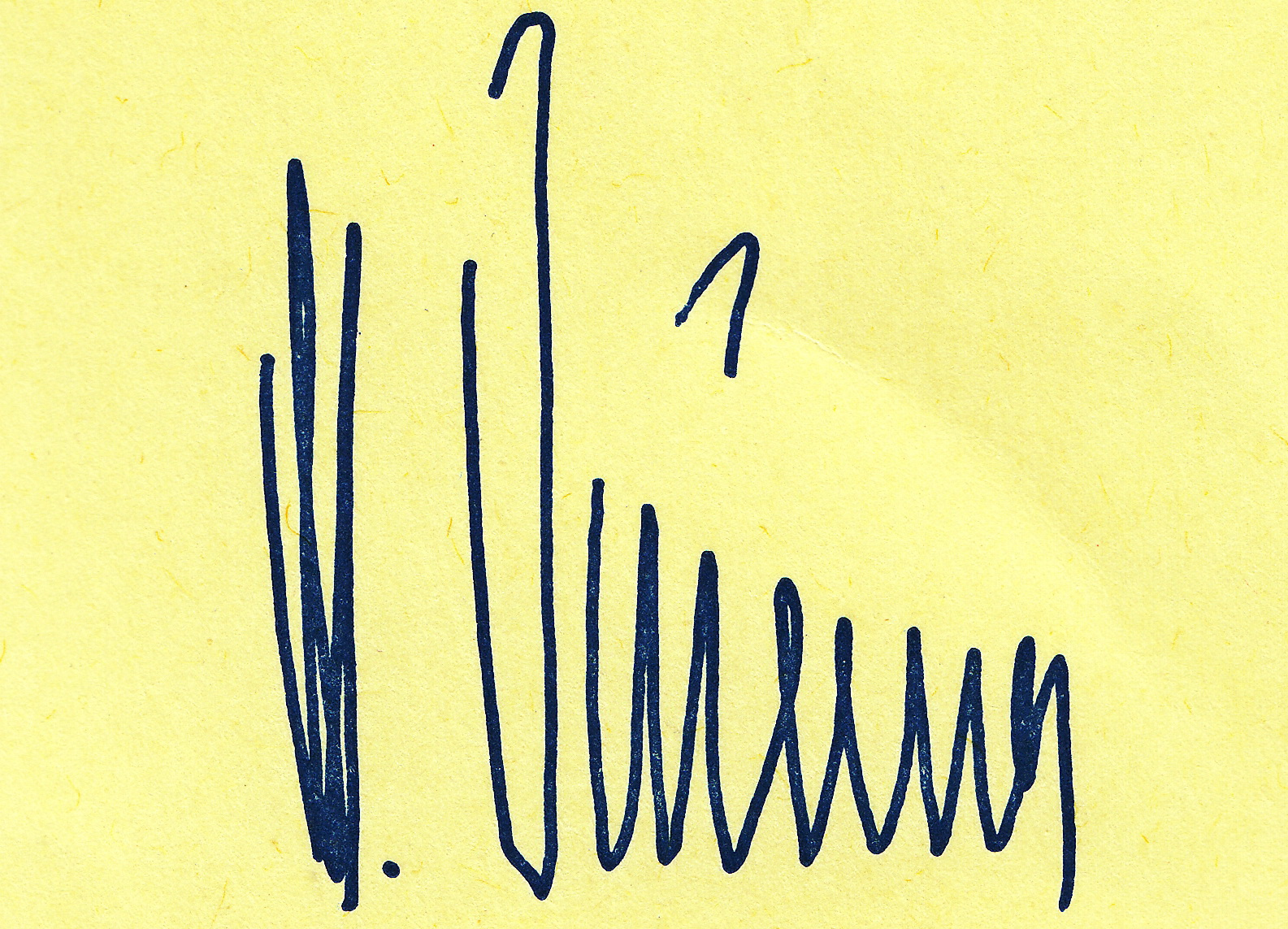 Unterschrift von Manfred Hermann Wörner 1986 als Bundesminister der Verteidigung